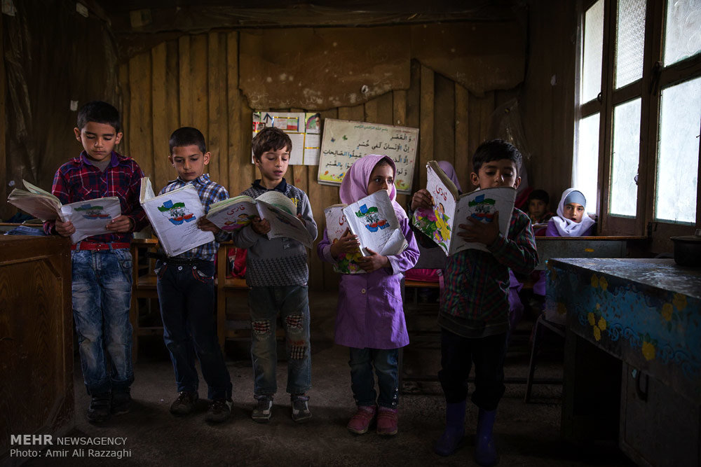 دبستان امام حسن المجتبی(ع) در منطقه صعب العبور روستای محروم اسبو استان مازندران از نداشتن آب آشامیدنی ، وسایل گرمایش برای فصل سرما ، سرویس بهداشتی ، تلفن ، گاز و همچنین جاده بسیار ناهموار رنج میبرد.